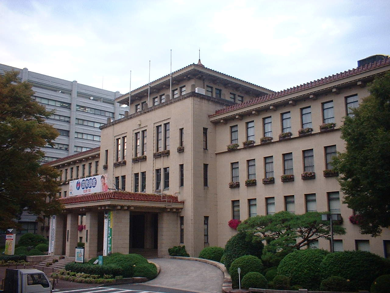 静岡県庁本館